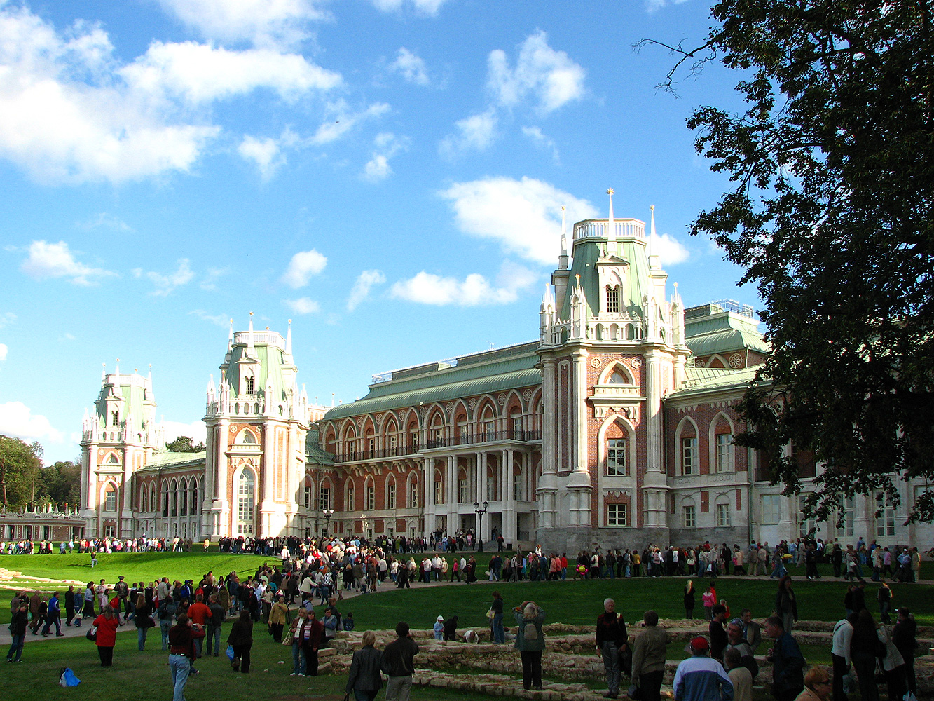 В день официального открытия музейного комплекса. (День города)